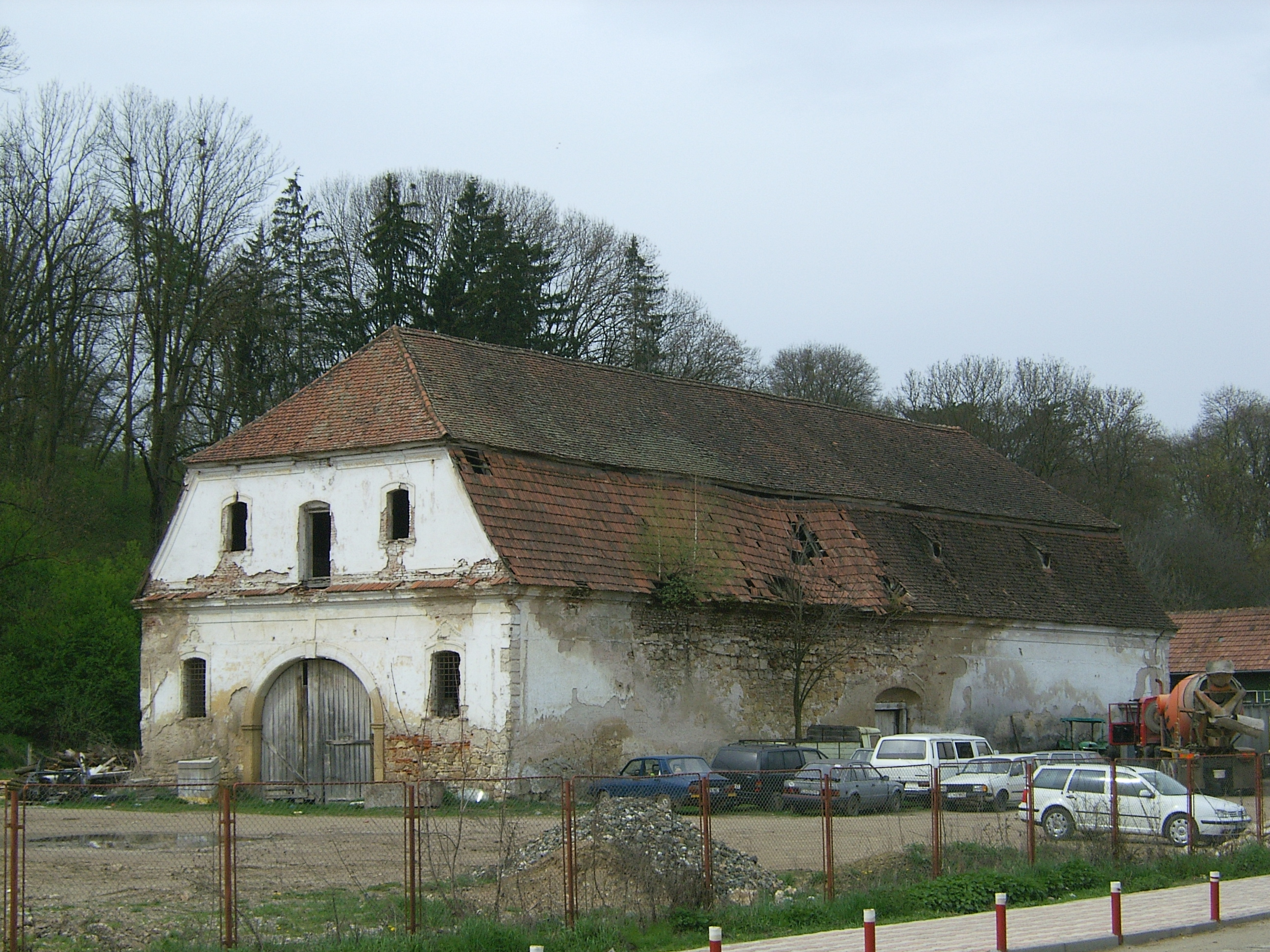 Gyalu (Erdély)